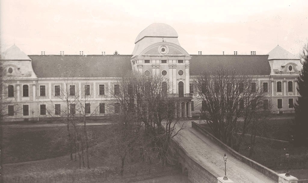 Dvorac Pejačević